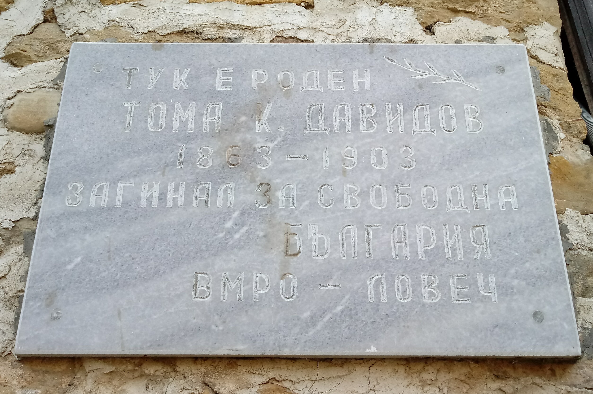 Toma Davidov memorial plaque, Lovech